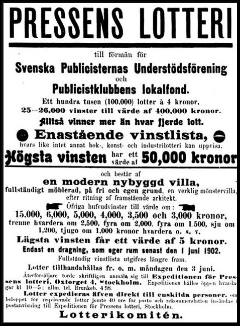 Annons om Pressens lotteri i Kalmar tidning